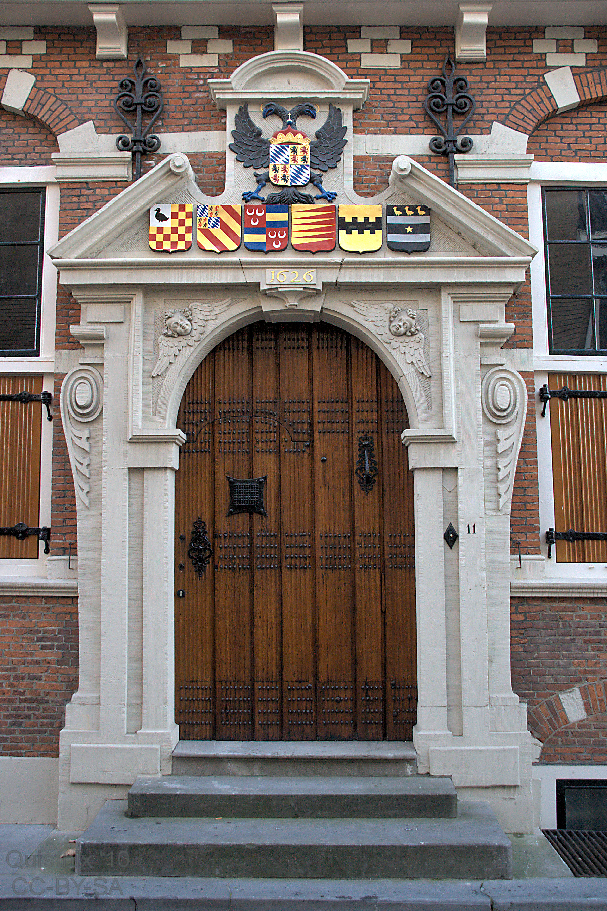 Maassluis: Deur Gemeenlandshuis Hoogheemraadschap van Delfland